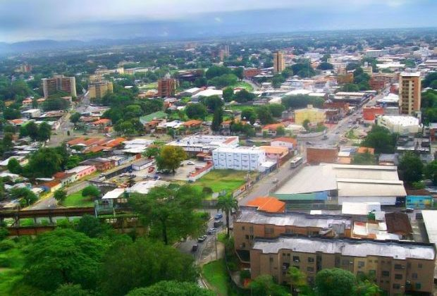 Panorámicas